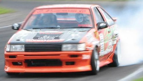 Drifting Toyota AE86.